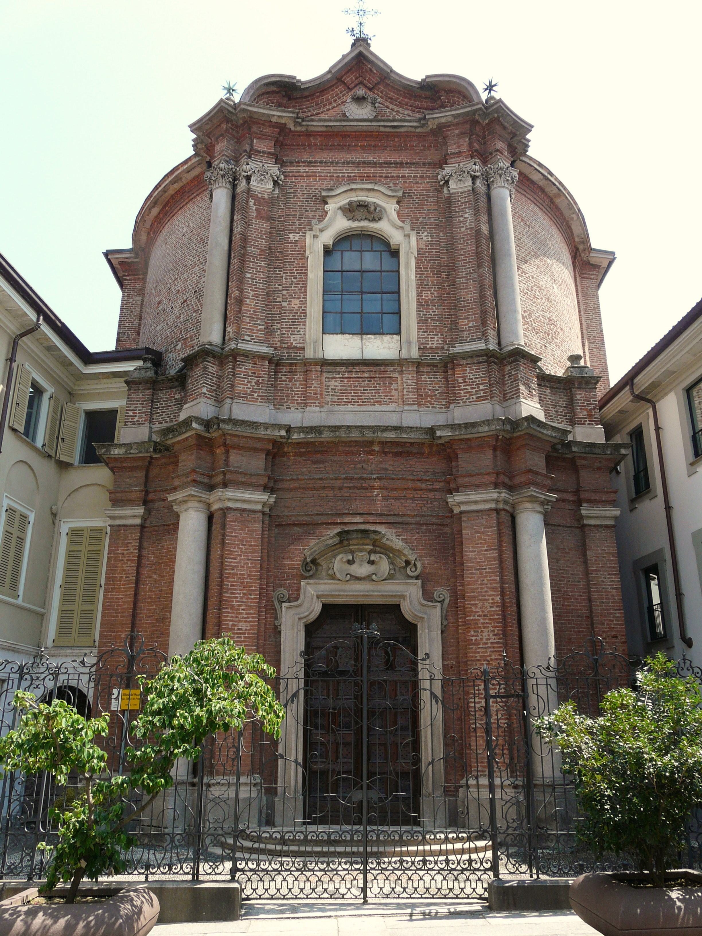 Chiesa di Santa Maria del Popolo, Vigevano, Lombardia, Italia